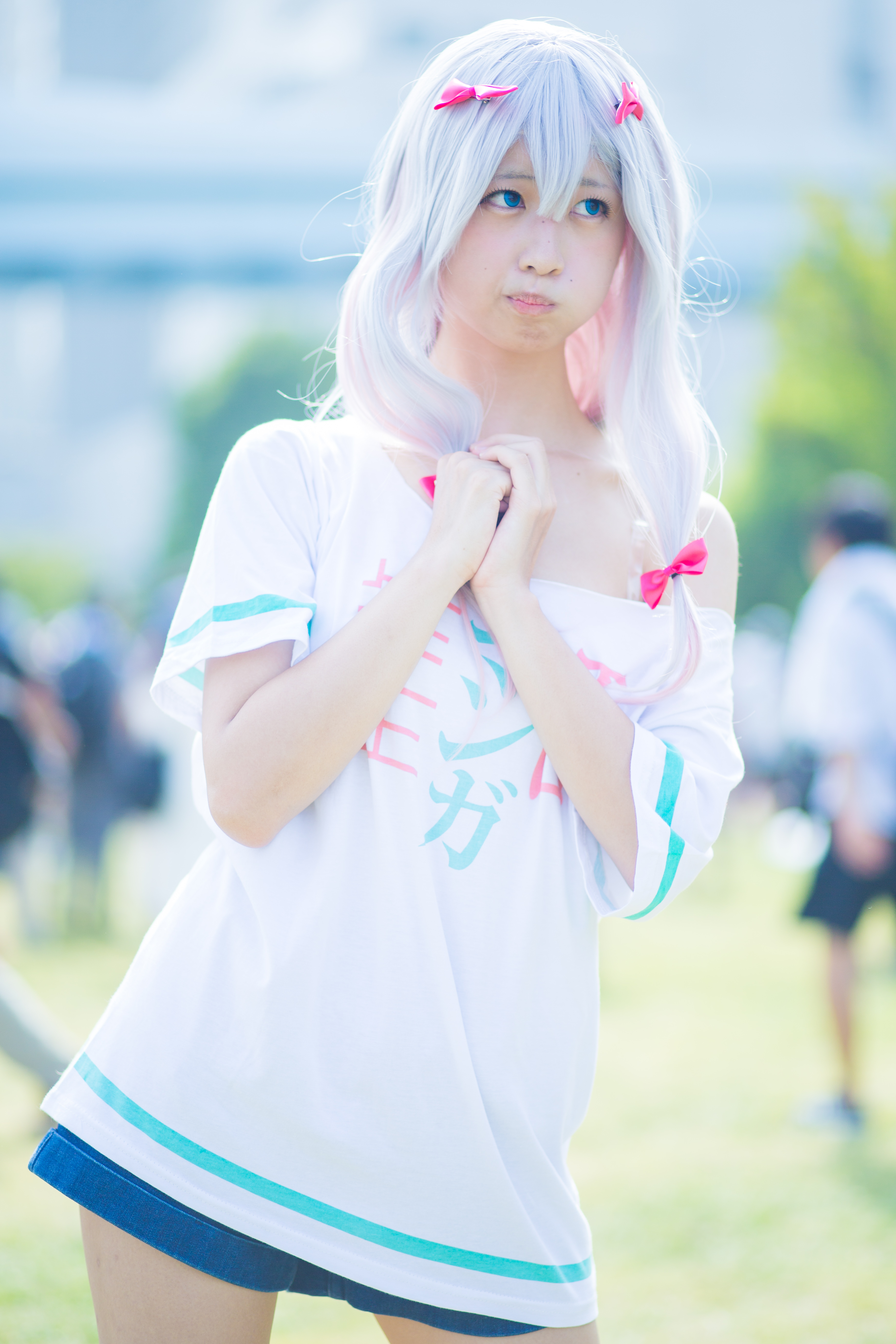 コミックマーケット94 3日目 コスプレイヤー